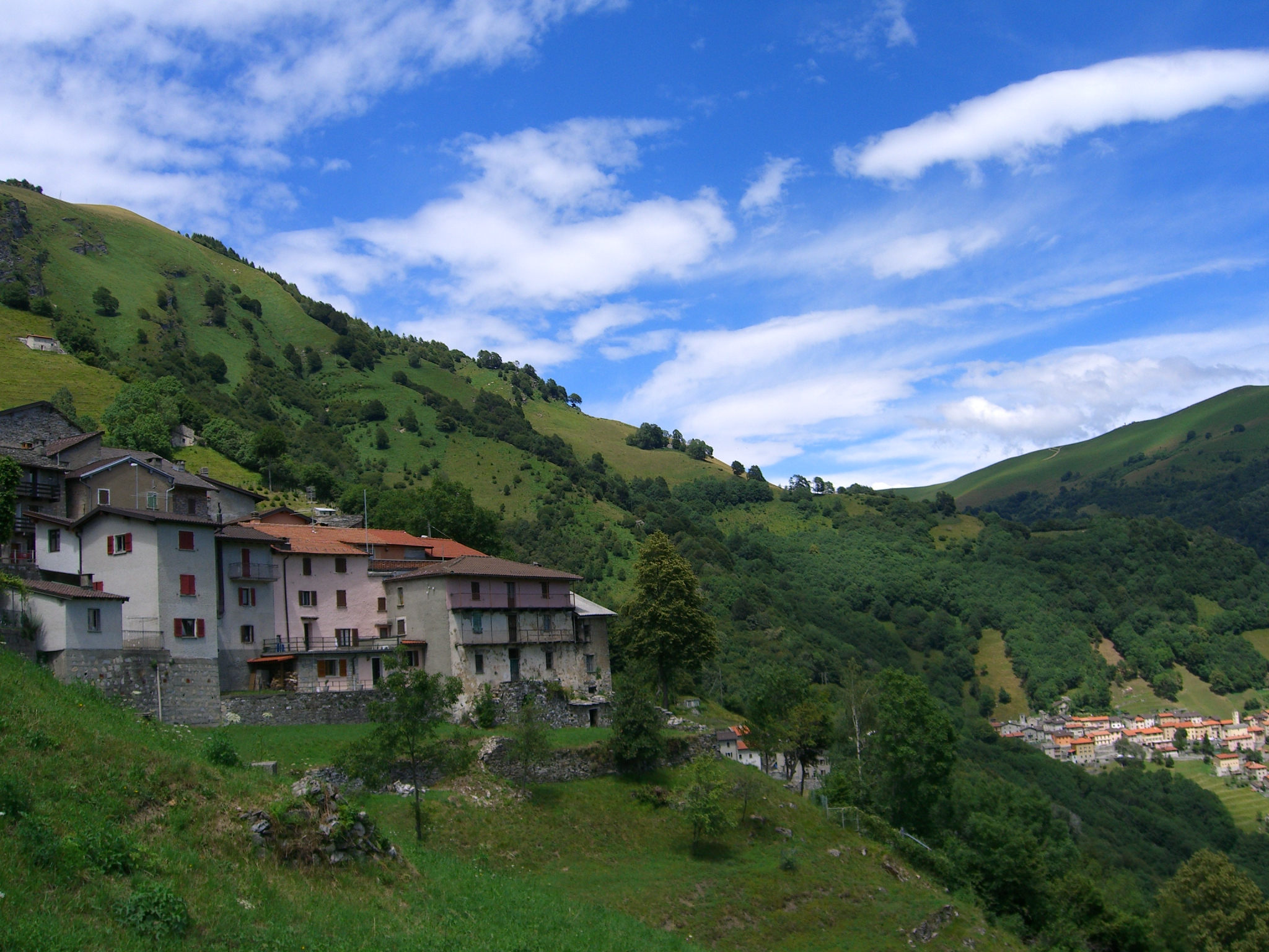 Valle di Muggio, Ticino, Switzerland